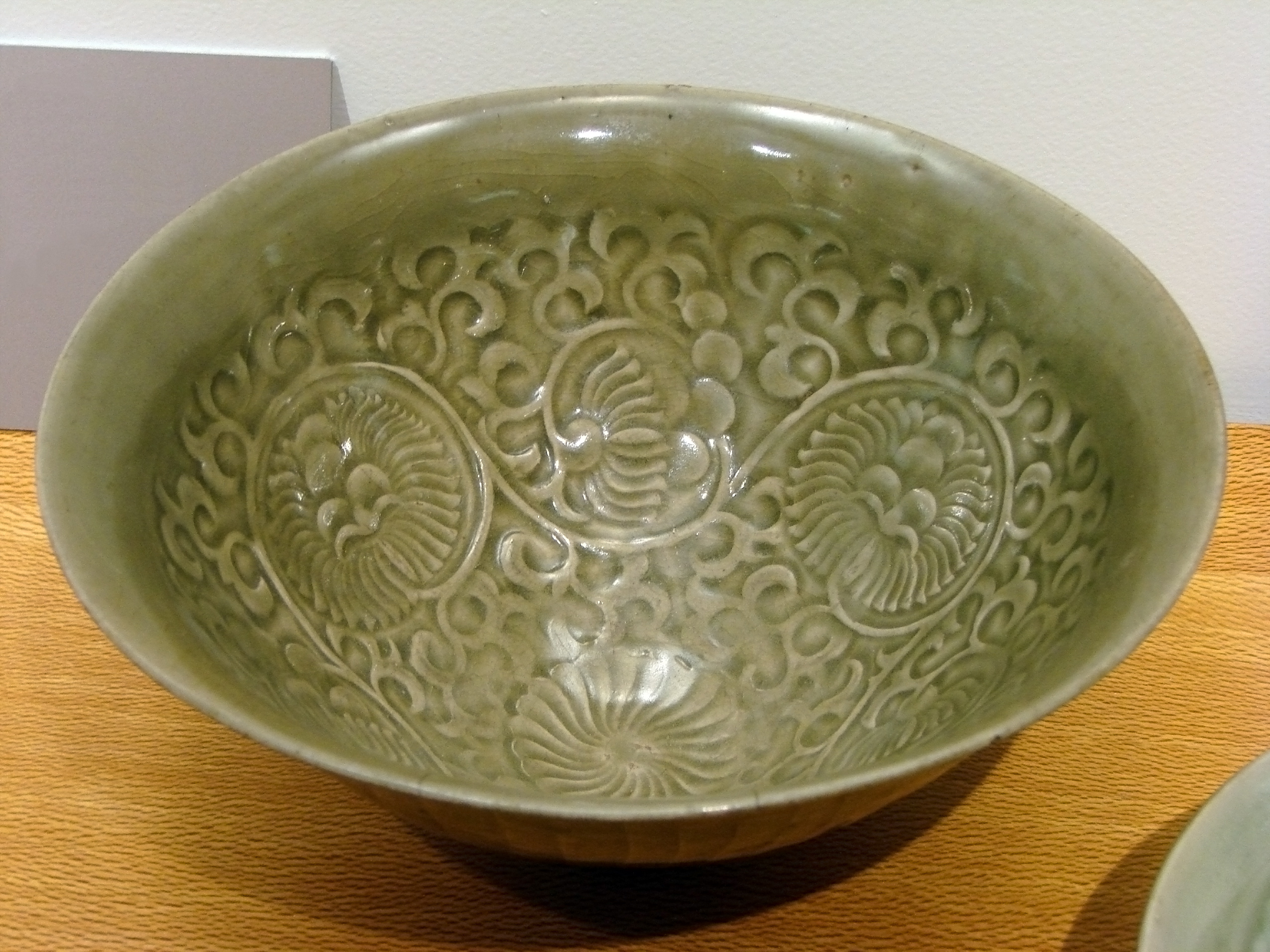 Coupe, grès de type céladon, décor incisé et moulé. Chine du Nord, Shaanxi, Yaozhou, Dynastie des Song du Nord, 10ème-11ème siècle. Musée Guimet, Paris.